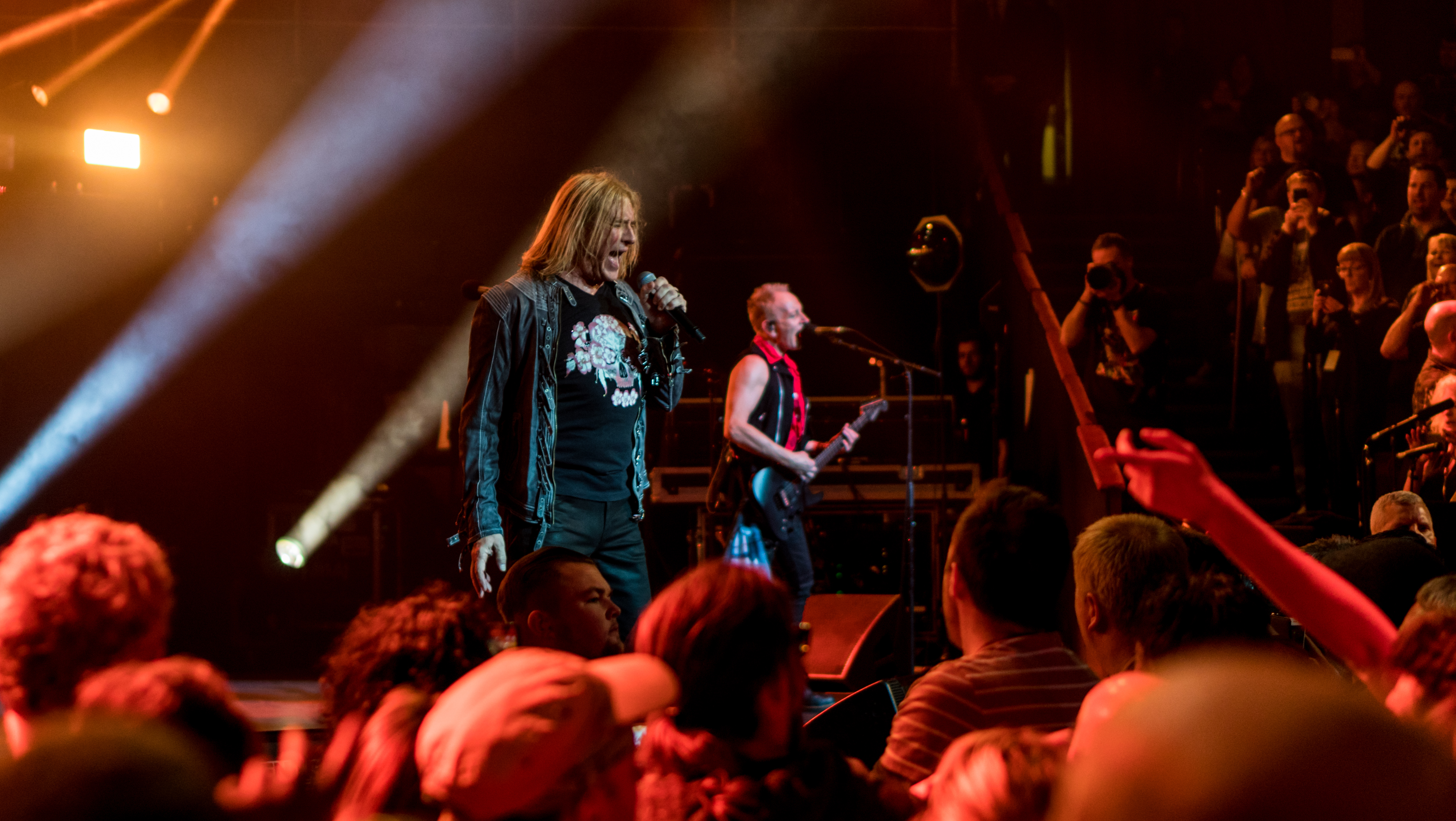 DefLepRAH250318-47